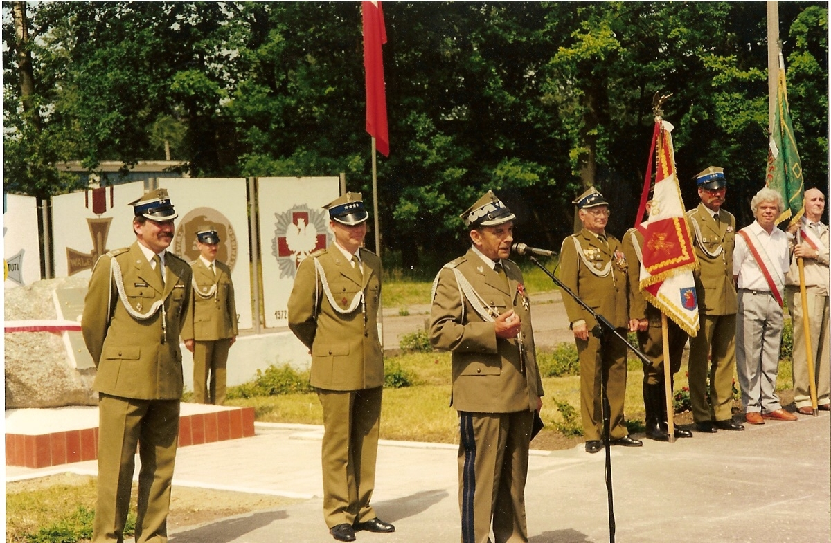 gen. Zdzisław Głuszczyk w 29 BZ w Szczecinie